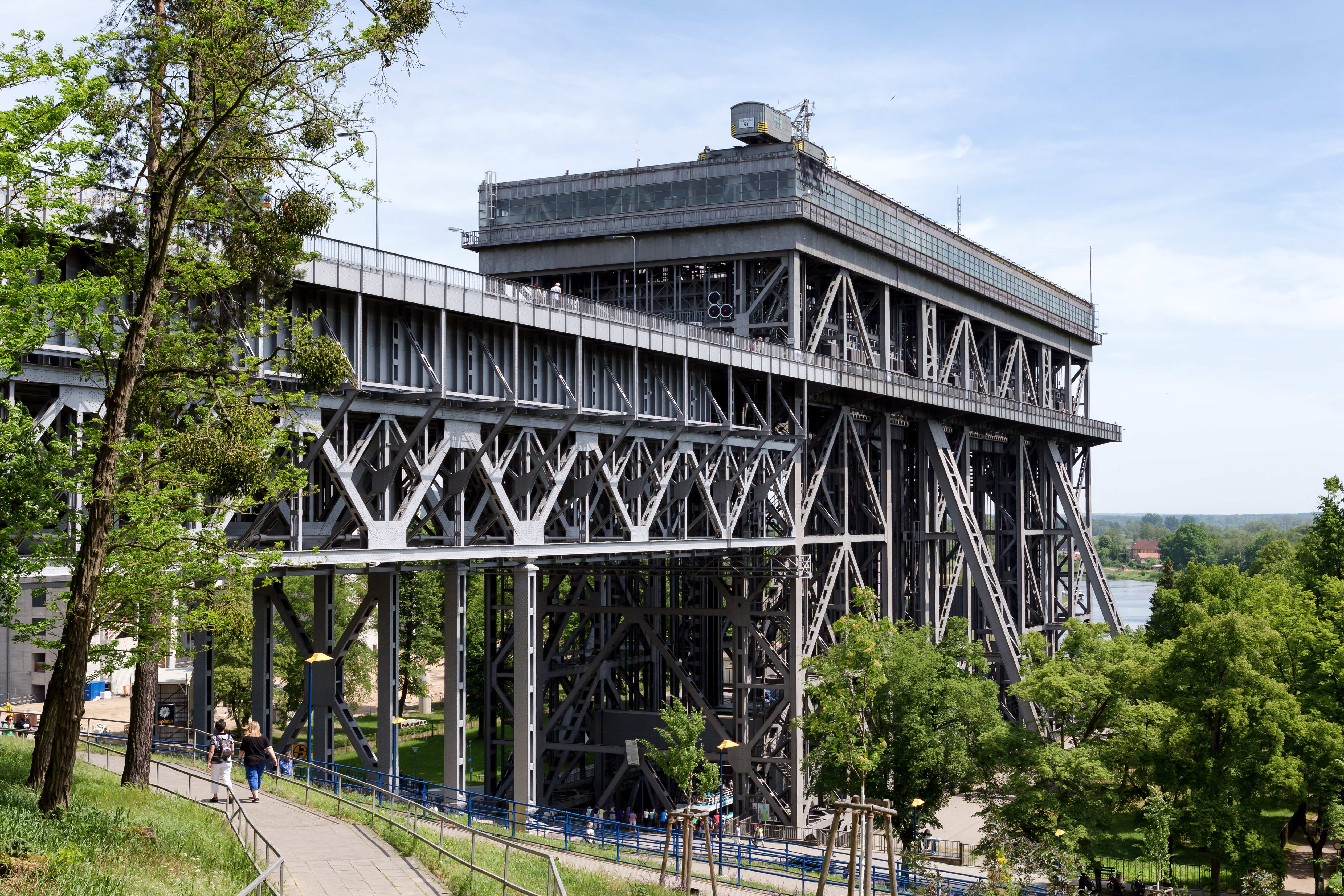 Schiffshebewerk Niederfinow - 2016, ID 09175003.